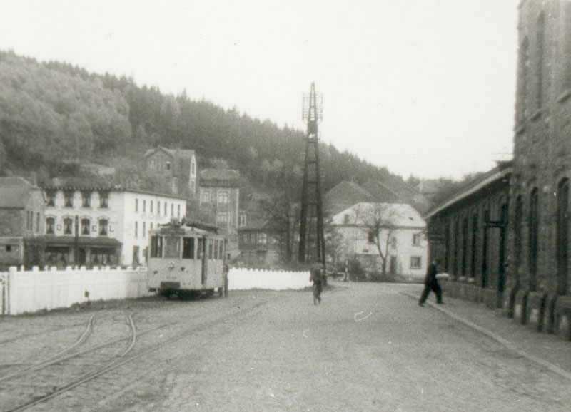 Autorail en gare de Poix